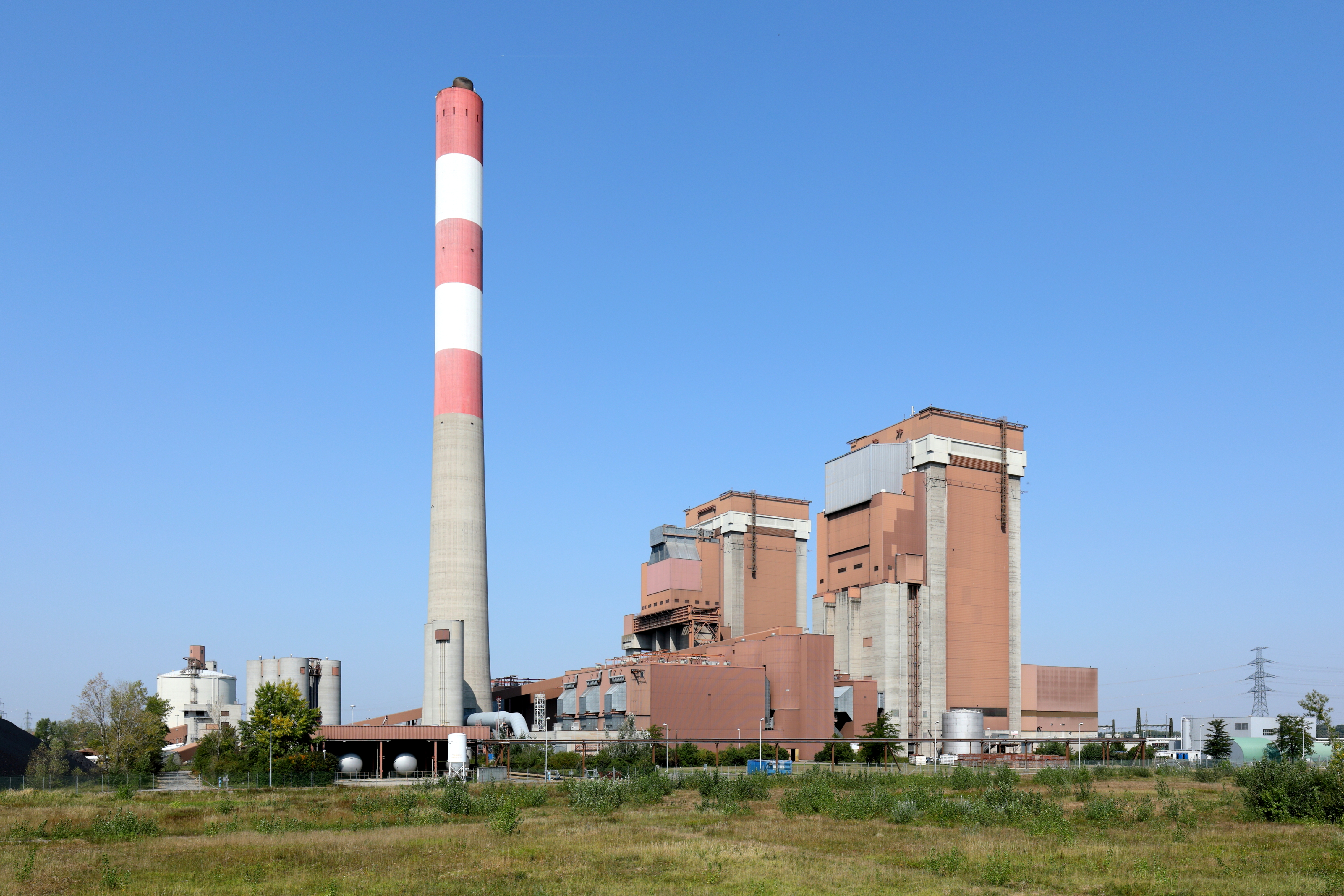 Südostansicht des Dampfkraftwerkes in Dürnrohr, ein Ortsteil der niederösterreichische Marktgemeinde Zwentendorf an der Donau.Das kalorische Kraftwerk mit einem rd. 205 m hohen Schornstein und zwei Kraftwerksblöcken mit je einer Leistung von rd. 350 MW wurde 1987 in Betrieb genommen und ist das letzte Kohlekraftwerk Österreichs. Der Wirkungsgrad wird durch die Auskopplung von Fernwärme, mit der St. Pölten und die Ortschaften Zwentendorf sowie Pischelsdorf versorgt werden, erhöht. Zusätzlich liefert das Kraftwerk der Bioethanolanlage der AGRANA einen Großteil des benötigten Prozessdampfes und erhält Dampf von der unmittelbar östlich situierten EVN-Abfallverwertung-Anlage. Anfang August 2019 wurde die Stromerzeugung mittels Kohleverbrennung zur Gänze eingestellt.